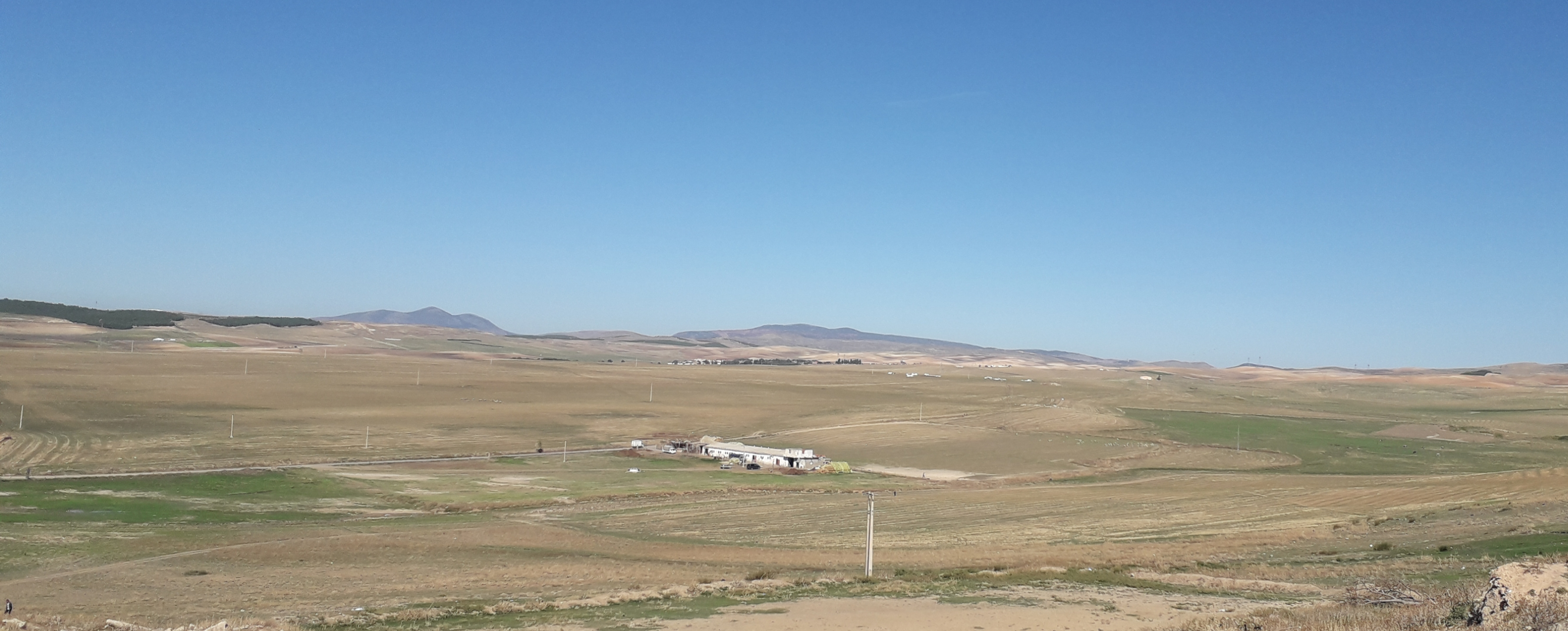 منظر طبيعي عام لقرية البوحيرة المنظر مأخوذ من عين ارنات